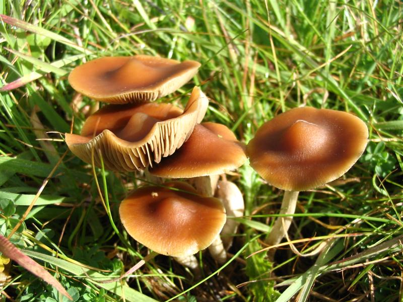 Psilocybe subaeruginosa in Australia.